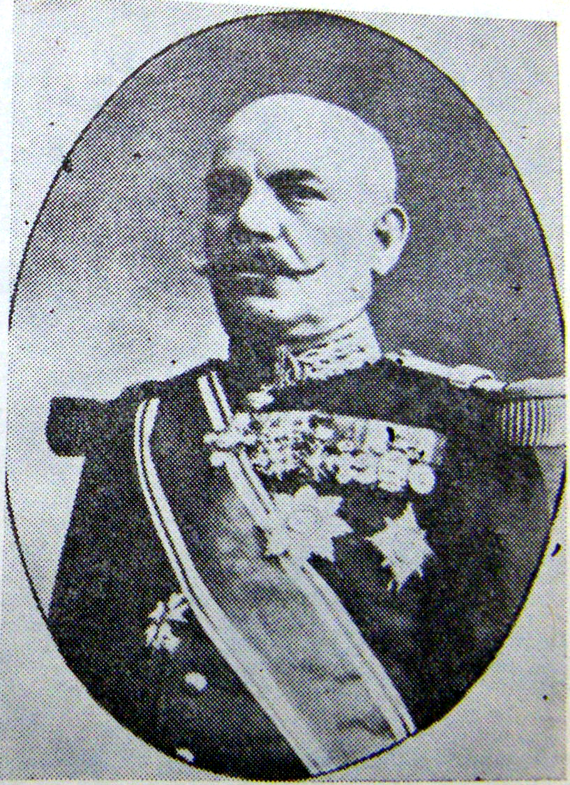 Generalul Ioan Culcer - comandantul Armatei 1 în 1916 Restricţii - Fără restricţii datorită vechimii